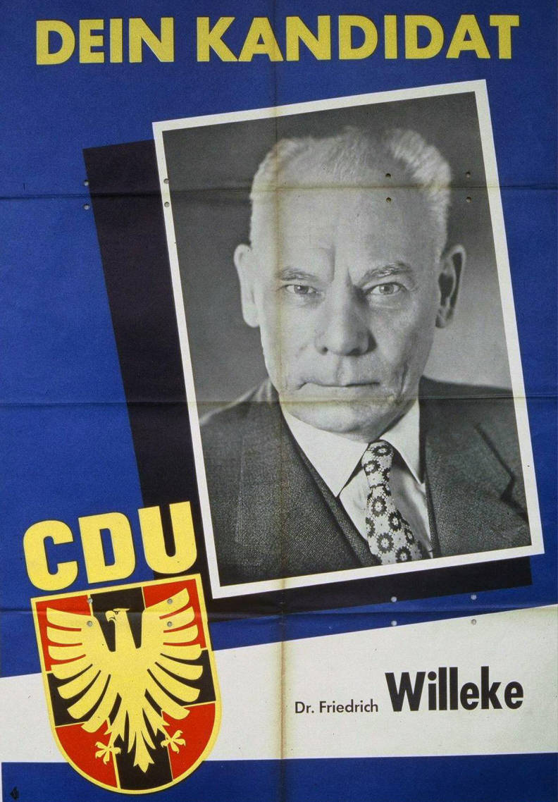 Dein Kandidat Dr. Friedrich Willeke Abbildung: Porträtfoto Plakatart: Kandidaten-/Personenplakat mit Porträt Objekt-Signatur: 10-001: 658 Bestand: Plakate zu Bundestagswahlen (10-001) GliederungBestand10-18: Plakate zu Bundestagswahlen (10-001) » Die 3. Bundestagswahl am 15. September 1957 » CDU » Mit Porträtfoto Lizenz: KAS/ACDP 10-001: 658 CC-BY-SA 3.0 DE